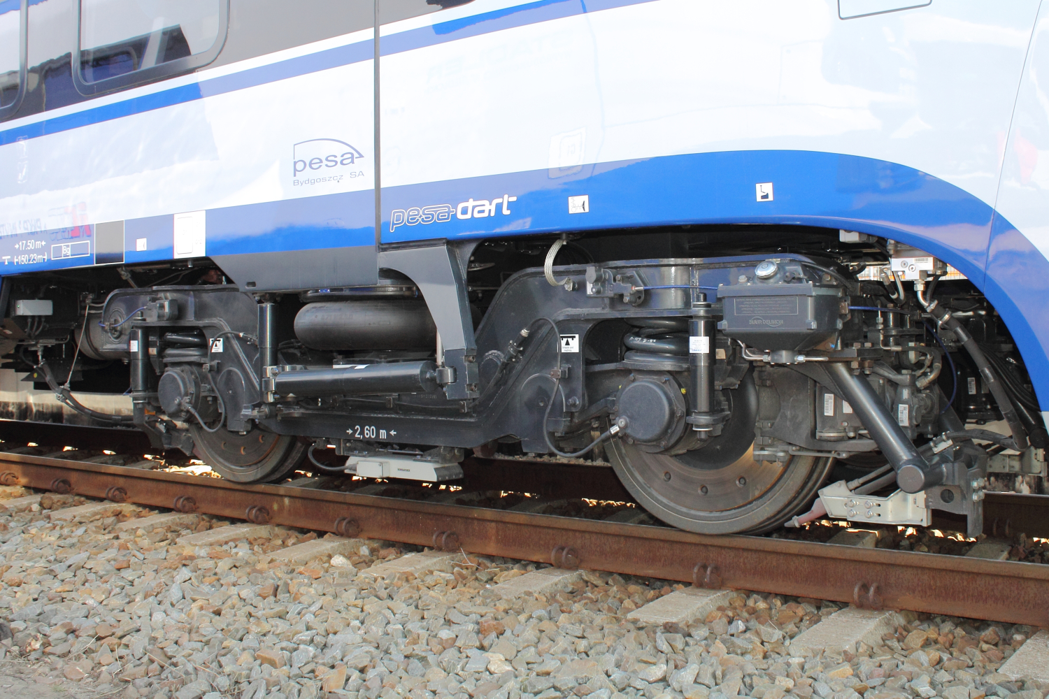 Wózek napędny elektrycznego zespołu trakcyjnego Pesa Dart ED161-004 podczas targów Trako 2015. The making of this document was supported by Wikimedia Polska Association, within Wikigrant no. WG 2015-34. English | polski | +/−